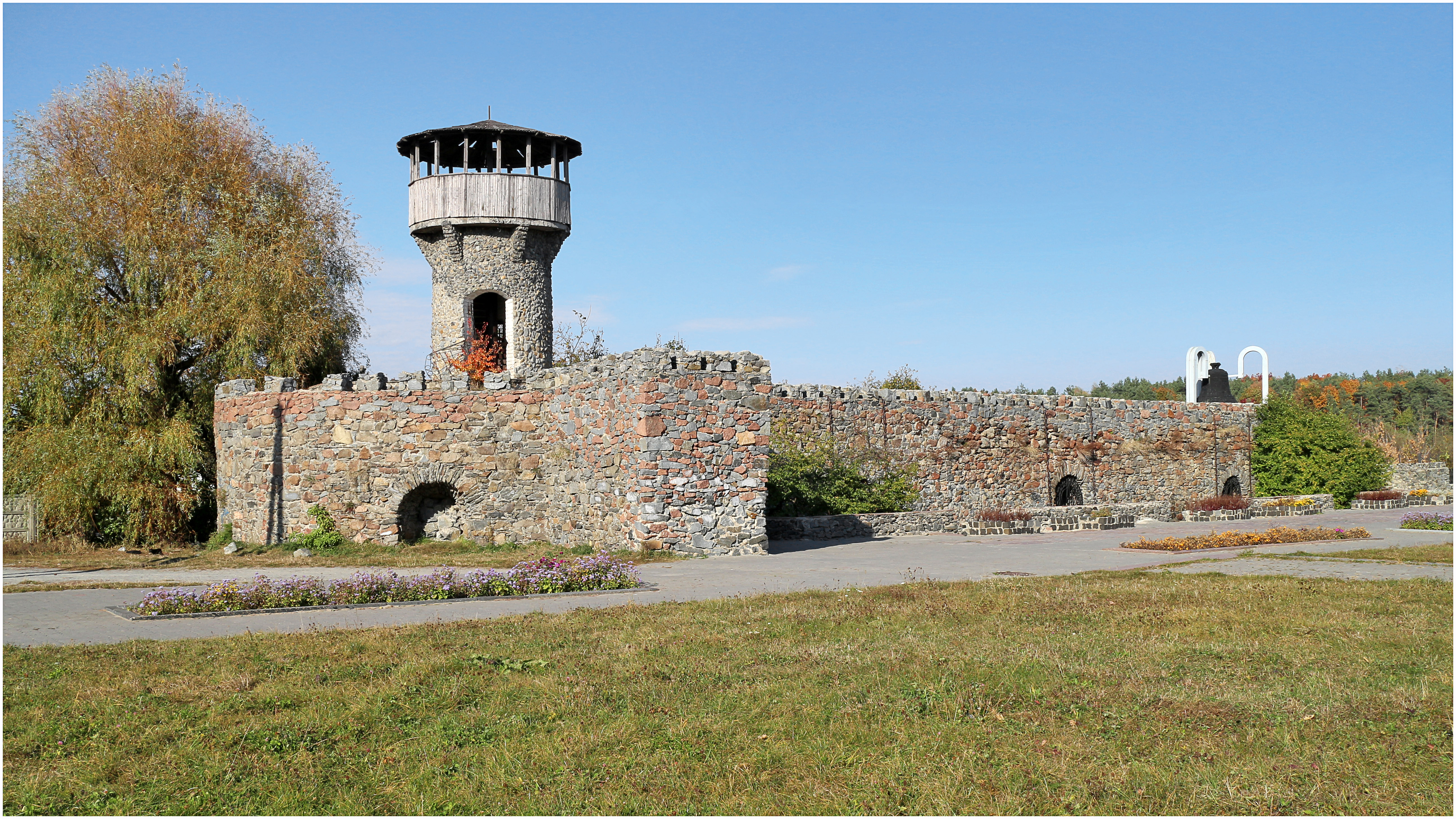 Замок, Новоград-Волинський, площа Л.Українки, 9